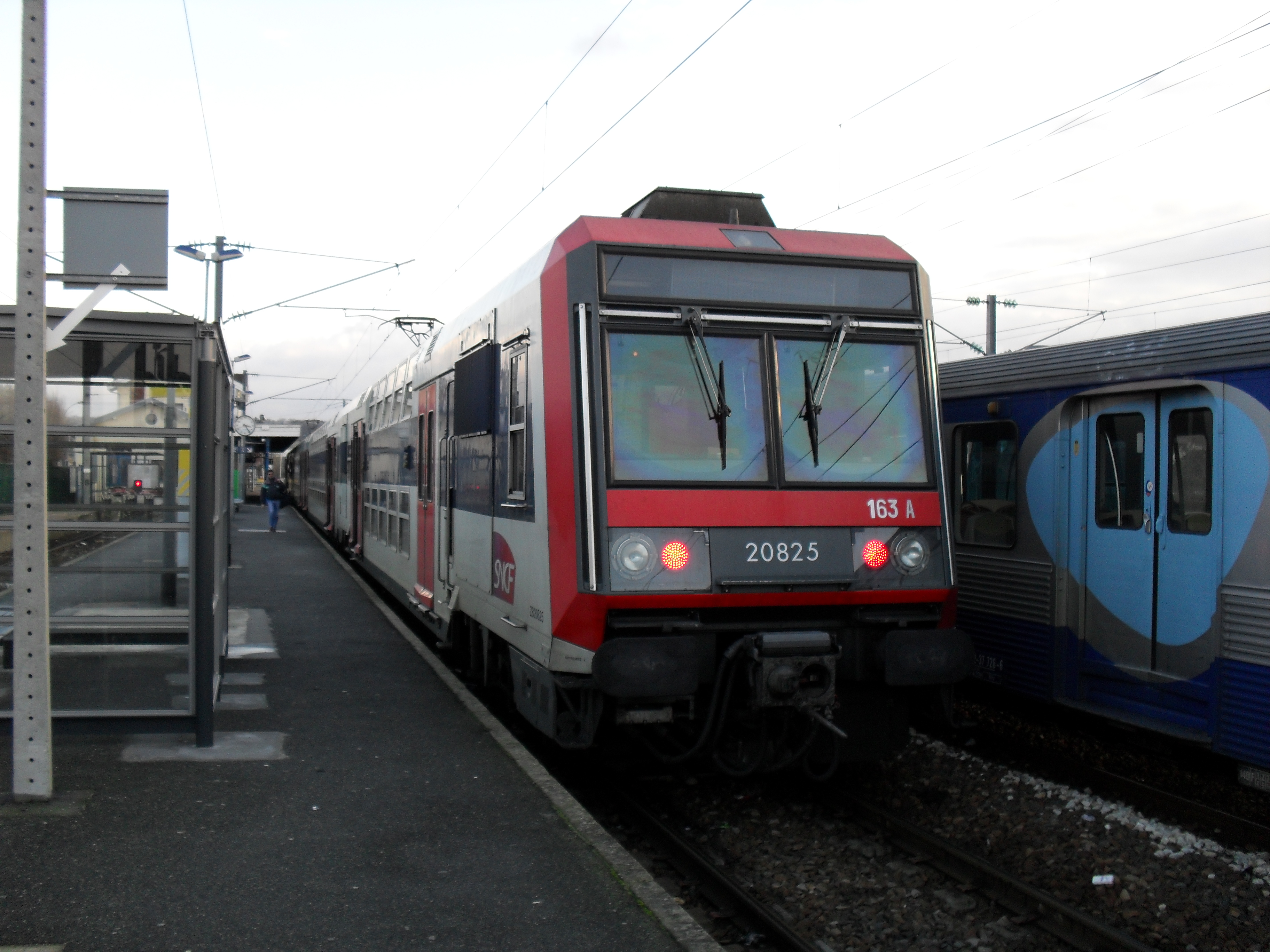 Z 20500 à Coulommiers